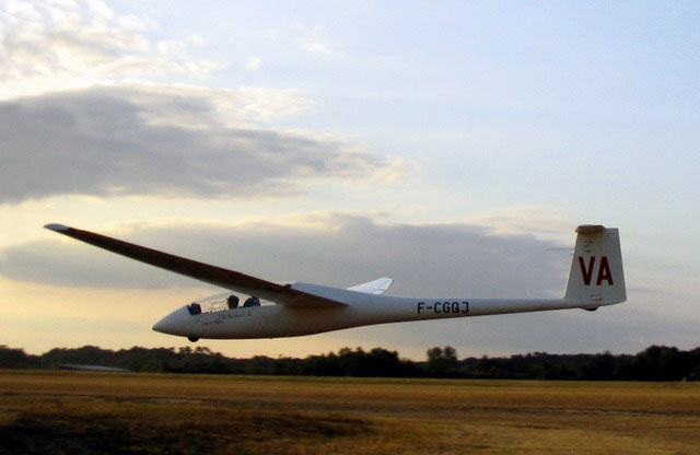 Planeur Schempp-Hirth Janus en passage à Angers-Marcé